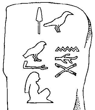 tomb stela of the royal lady Nacht-Neith (first egyptian dynasty)